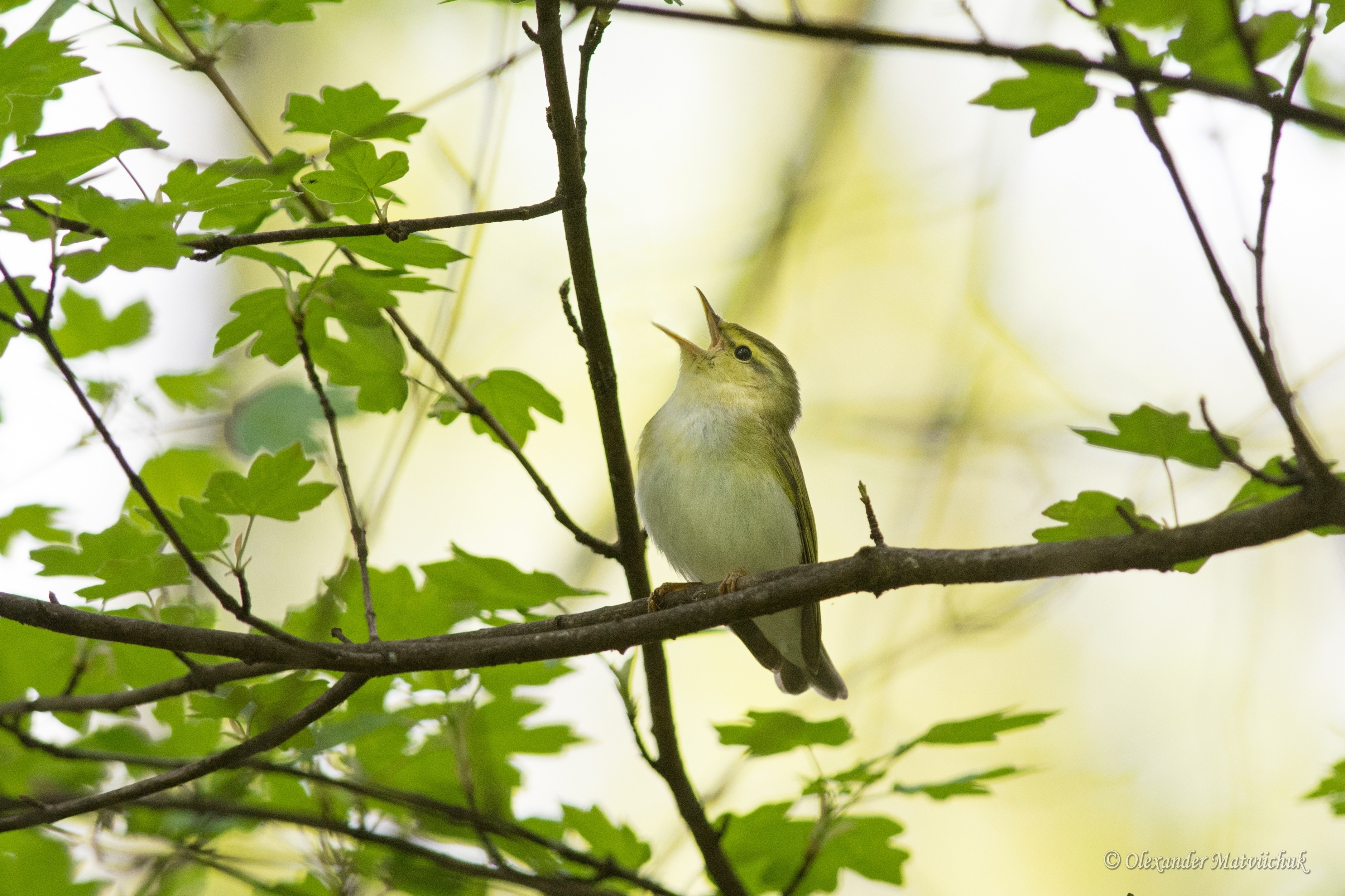 Буго-Деснянський, Вінницький р-н, Михайлівське л-во, кв. 15-34